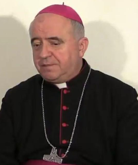 Ljubljanski pomožni škof msgr. dr. Franc Šuštar - Krščanske TV oddaje POT - I.